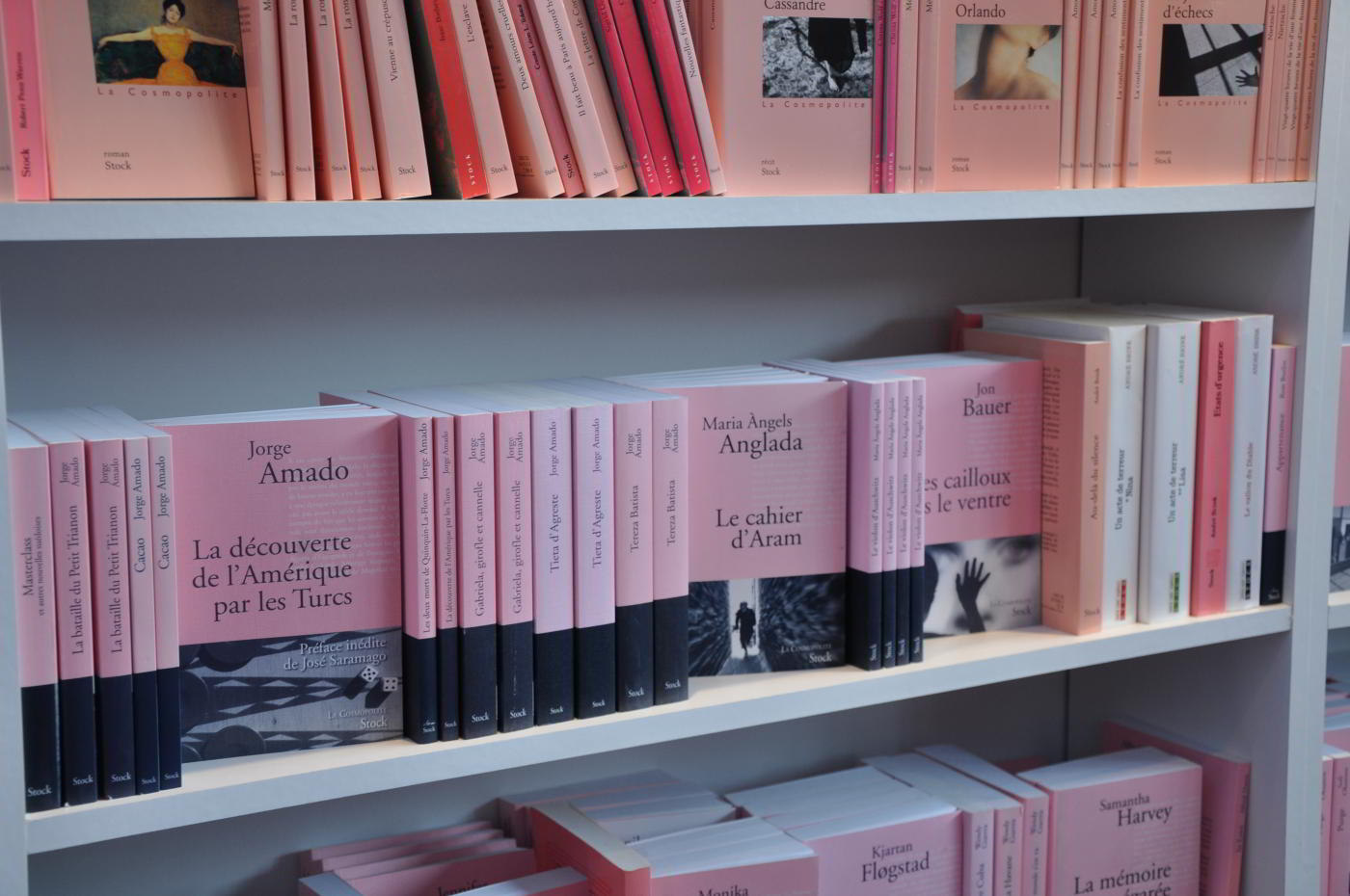 anglada